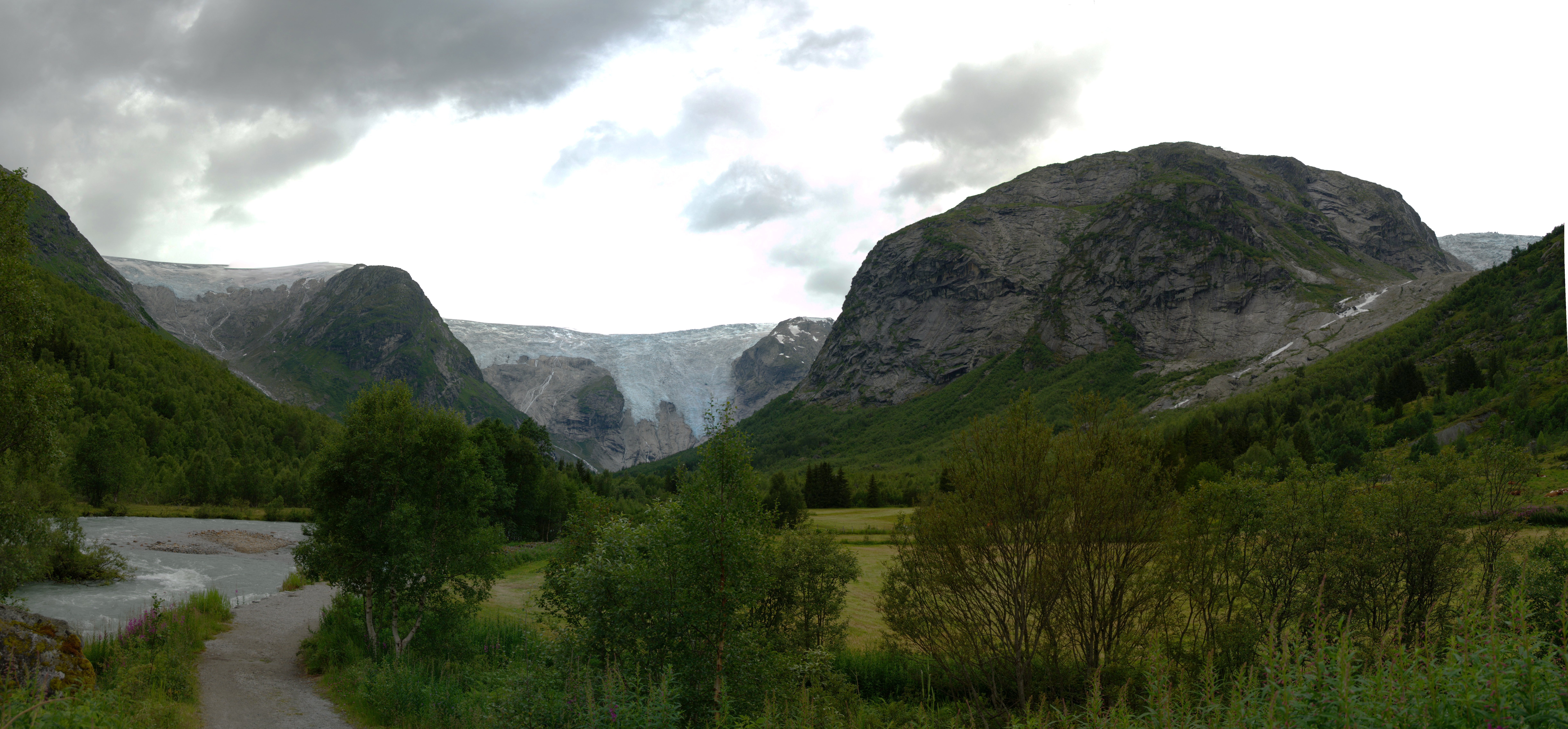 Towards Bergsetbreen in Luster, Norway